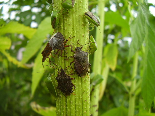 クサギカメムシ (scientific name:Halyomorpha halys)、チャバネアオカメムシ (scientific name:Plautia stali)、アオクサカメムシ (scientific name:Nezara antennata)